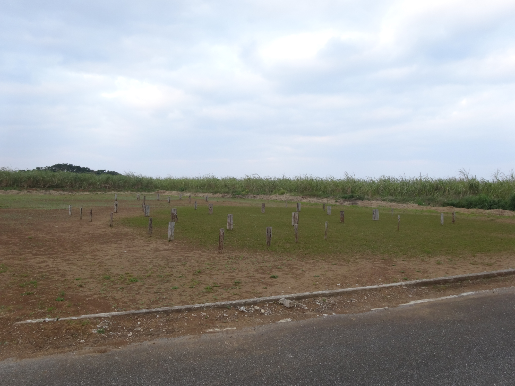 山田半田遺跡（鹿児島県大島郡喜界町にある城久遺跡群の一つ）